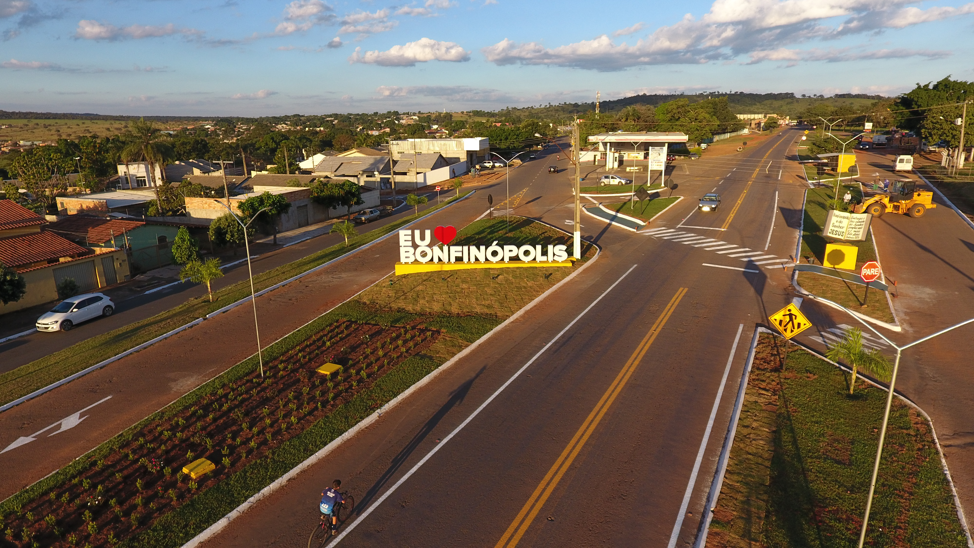 Trevo de entrada da cidade de Bonfinópolis GO - 2019, executado por ocasião do seu 30º aniversario de emancipação, dentro da administração do seu 8º prefeito municipal Professor Kelton Pinheiro (2017-2020)